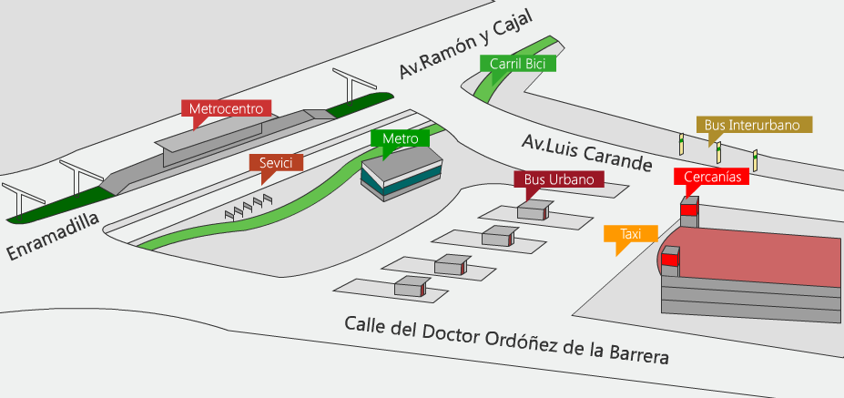 Intermodal en San Bernardo - Sevilla